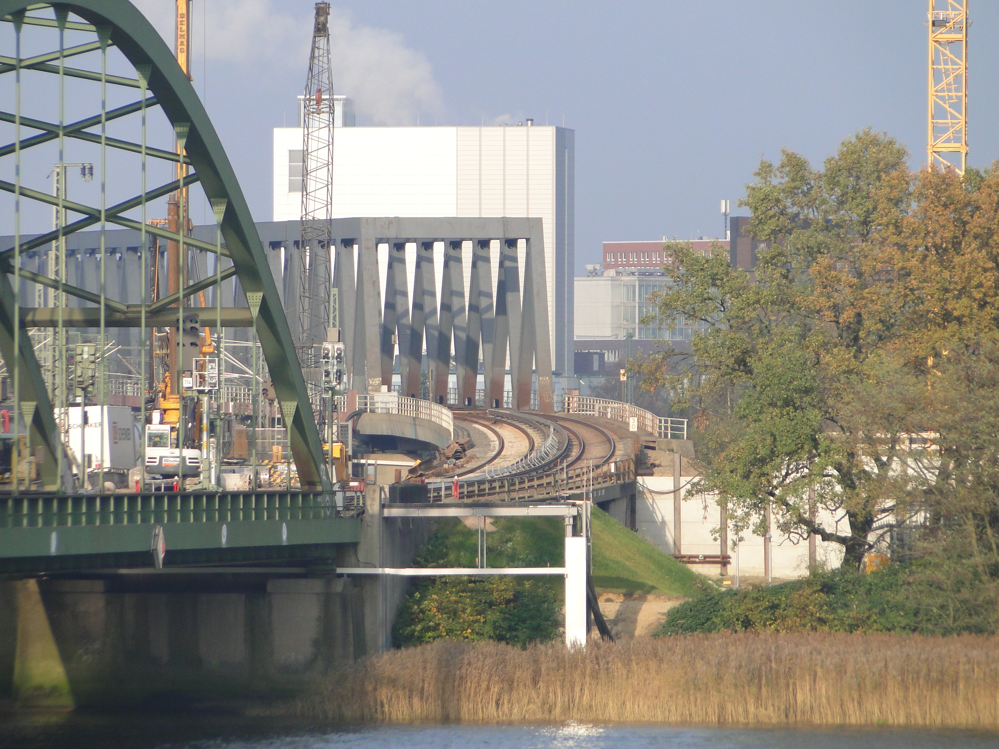 Lage des zukünftigen S-Bahnhof Elbbrücken